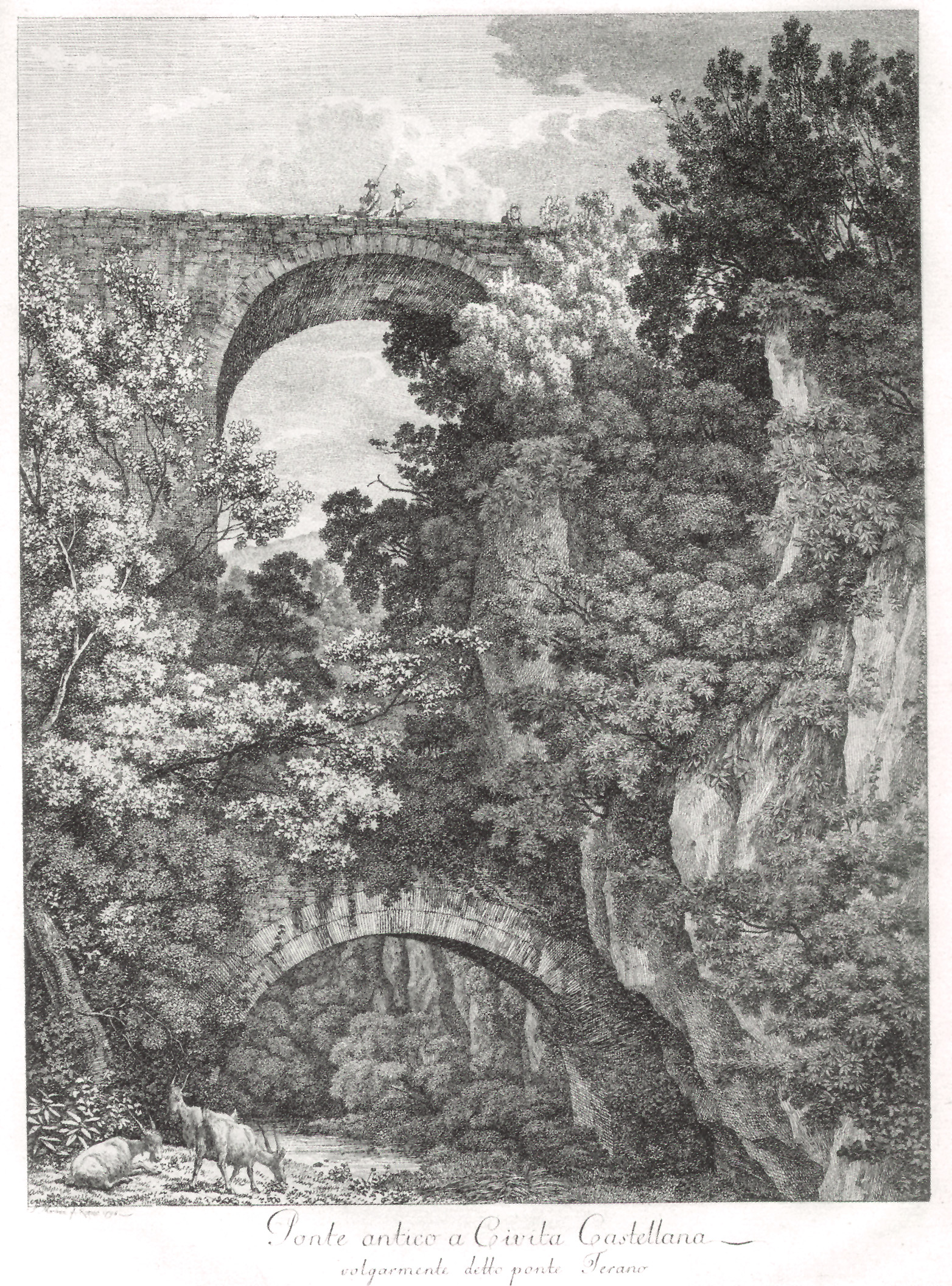 Der Ponte Terrano in Civita Castellana, 1795. Radierung. Höhe 38, Breite 28,1 cm (Platte) . Aus der Serie: "Mahlerisch radirte Prospecte von Italien" von Johann Christian Reinhart, Jakob Wilhelm Mechau und Albert Christoph Dies, Verlag Johann Friedrich Frauenholz in Nürnberg.